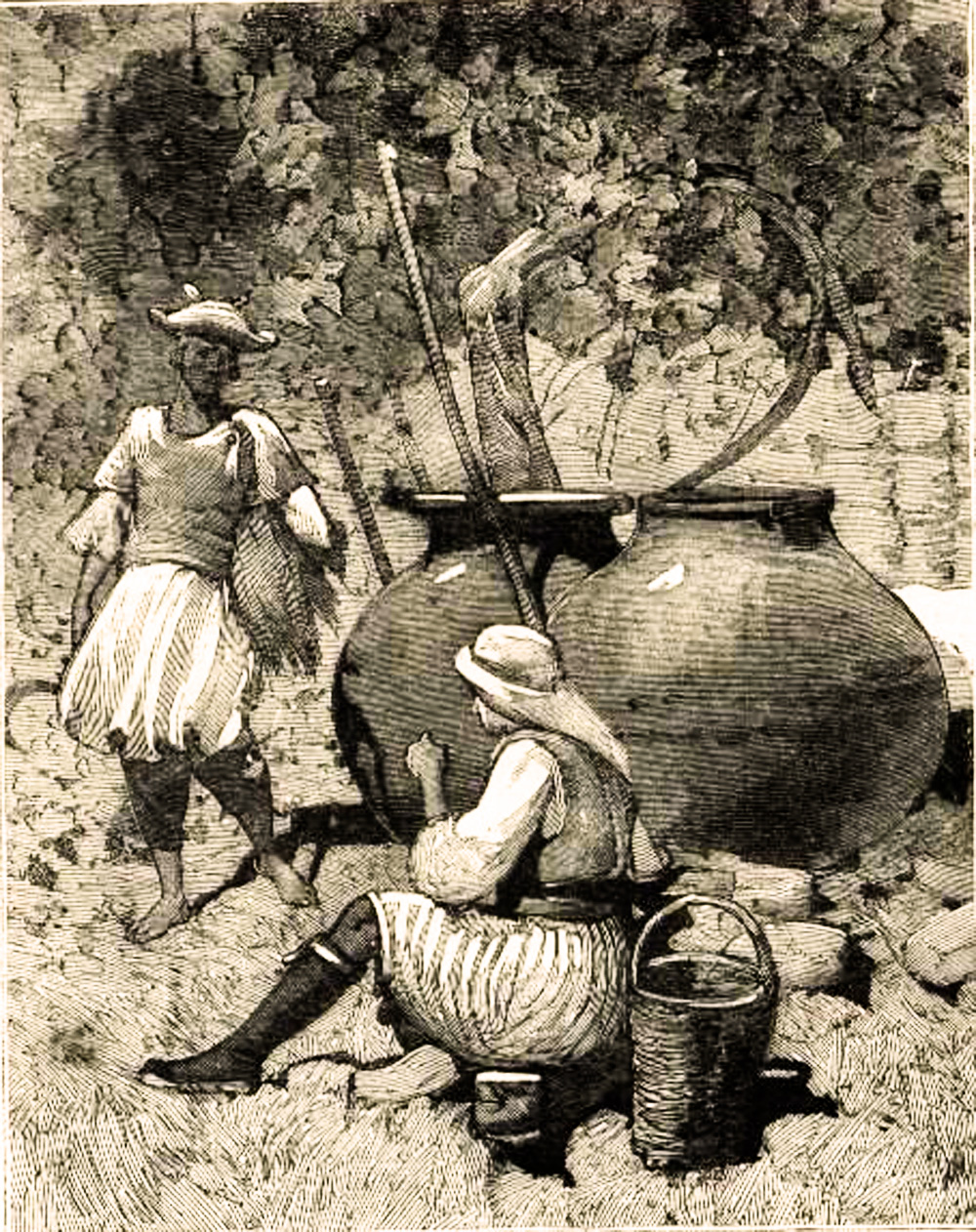 Jarres à vin des vignobles du château Saint-Hilarion, gravure de 1878